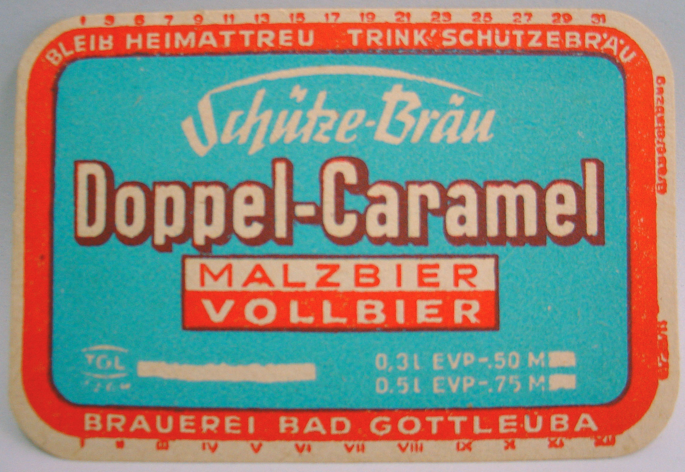 Flaschenetikette der Schütze-Bräu Brauerei Bad Gottleuba, Doppel-Caramel Malzbier